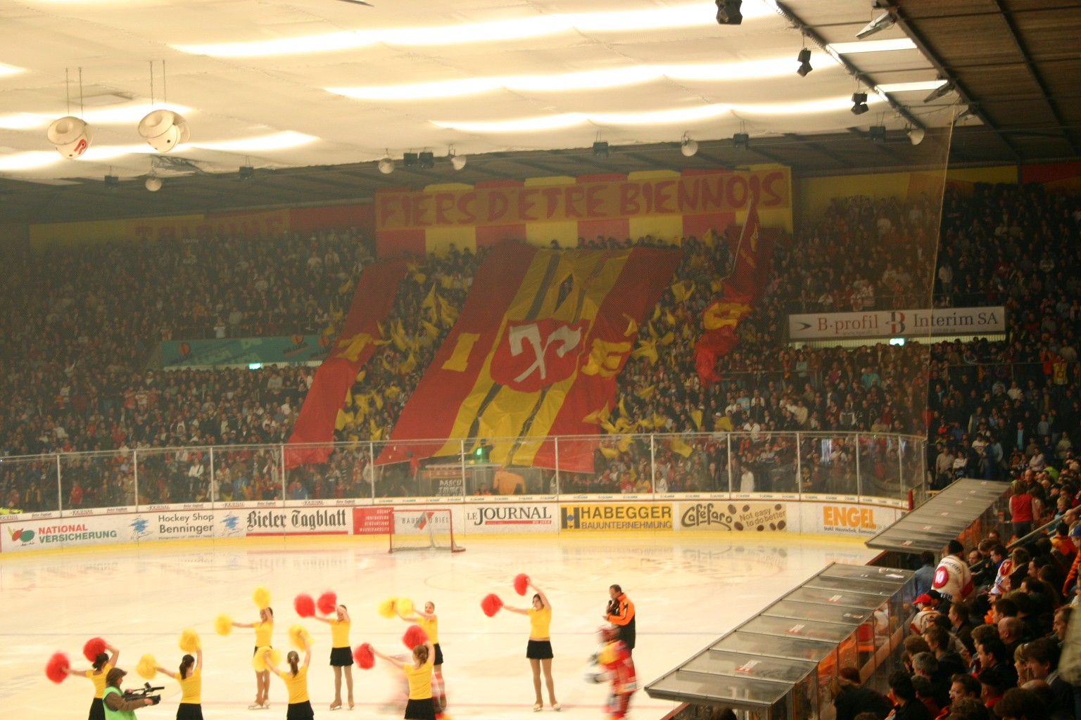 Fankurve des EHC Biel